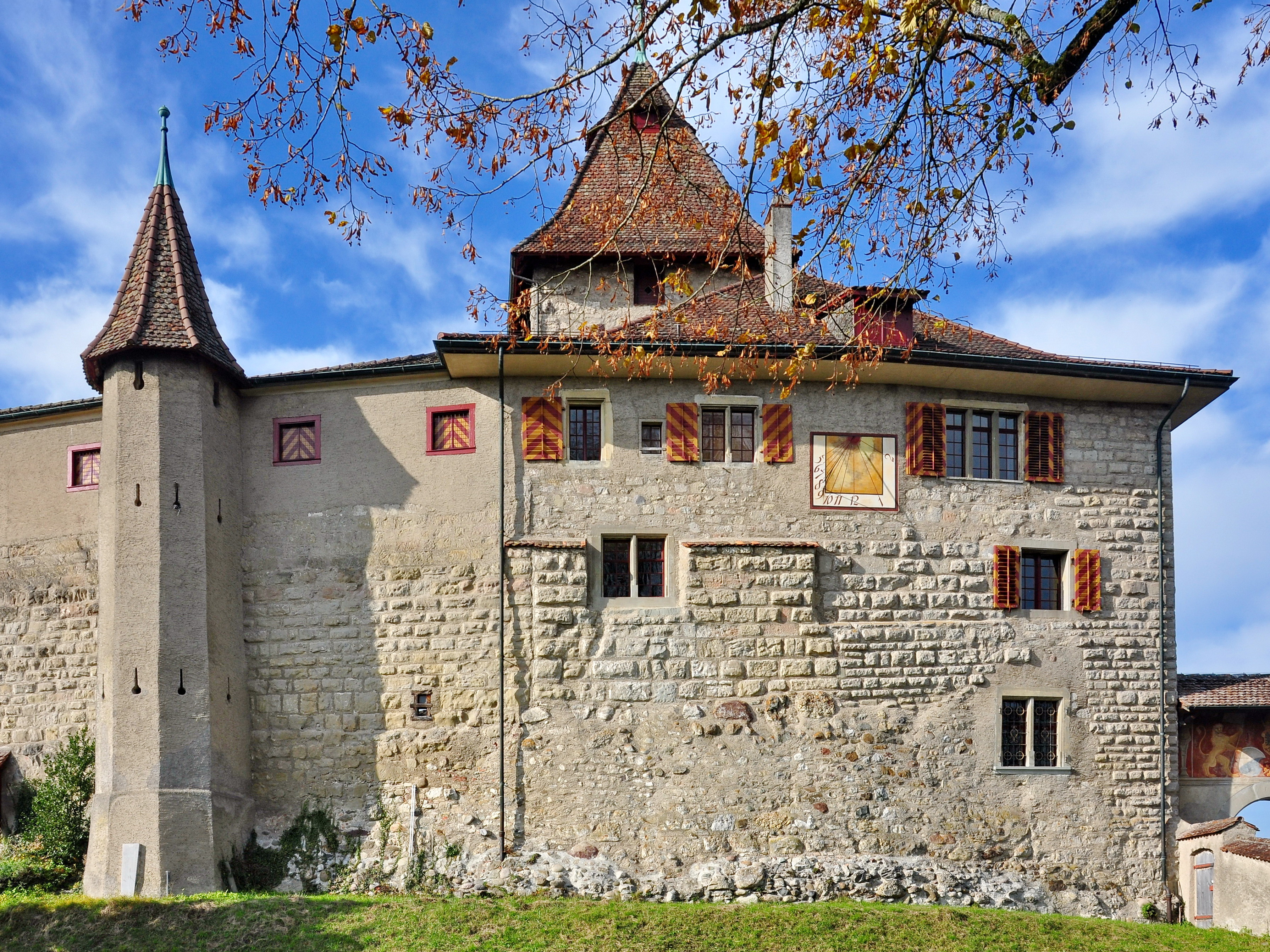 Schloss Kyburg in Kyburg (Switzerland)